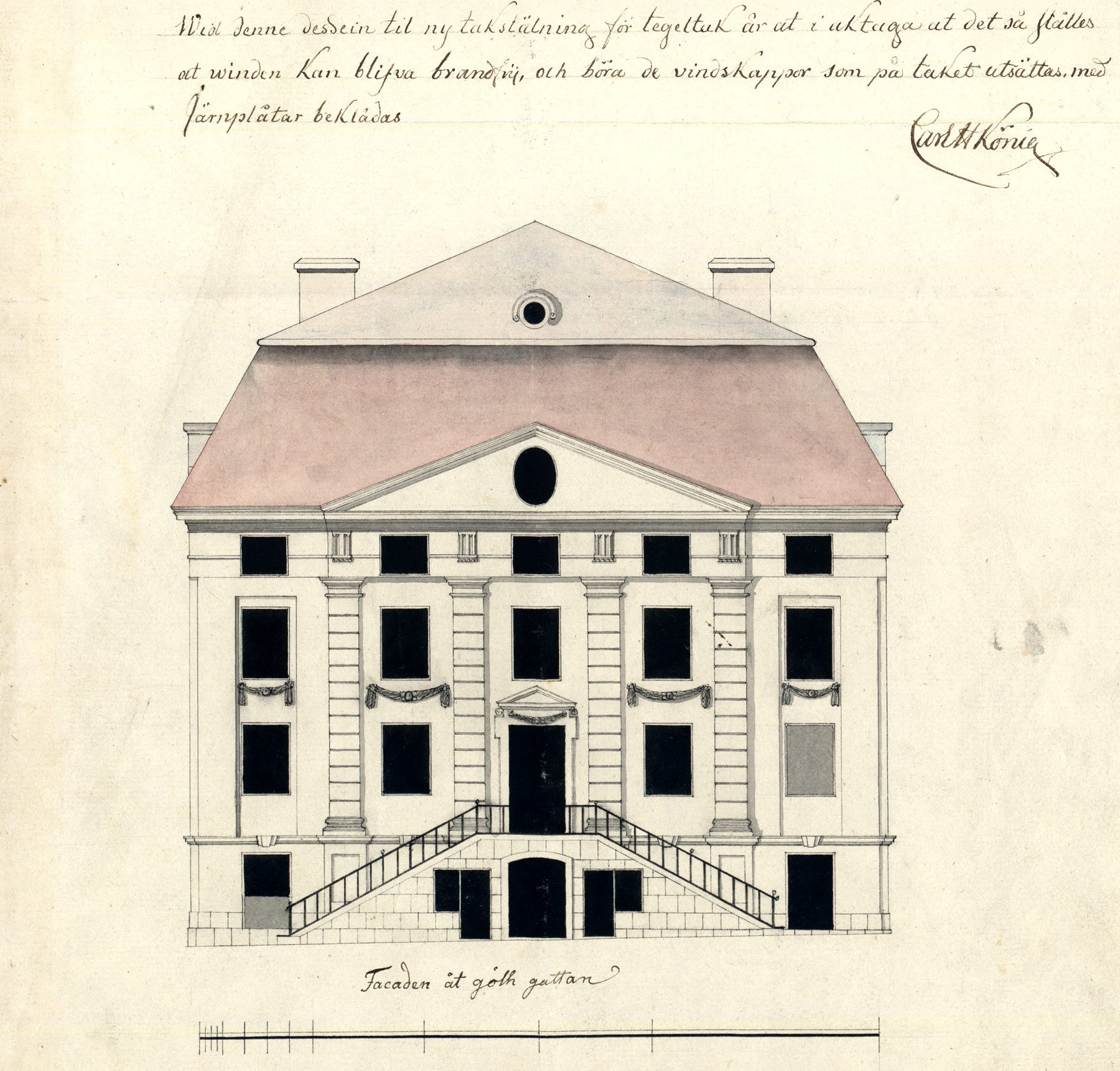 Lillienhoffska palatset, fasadritning, ombyggnad för St Catharina Fattighus